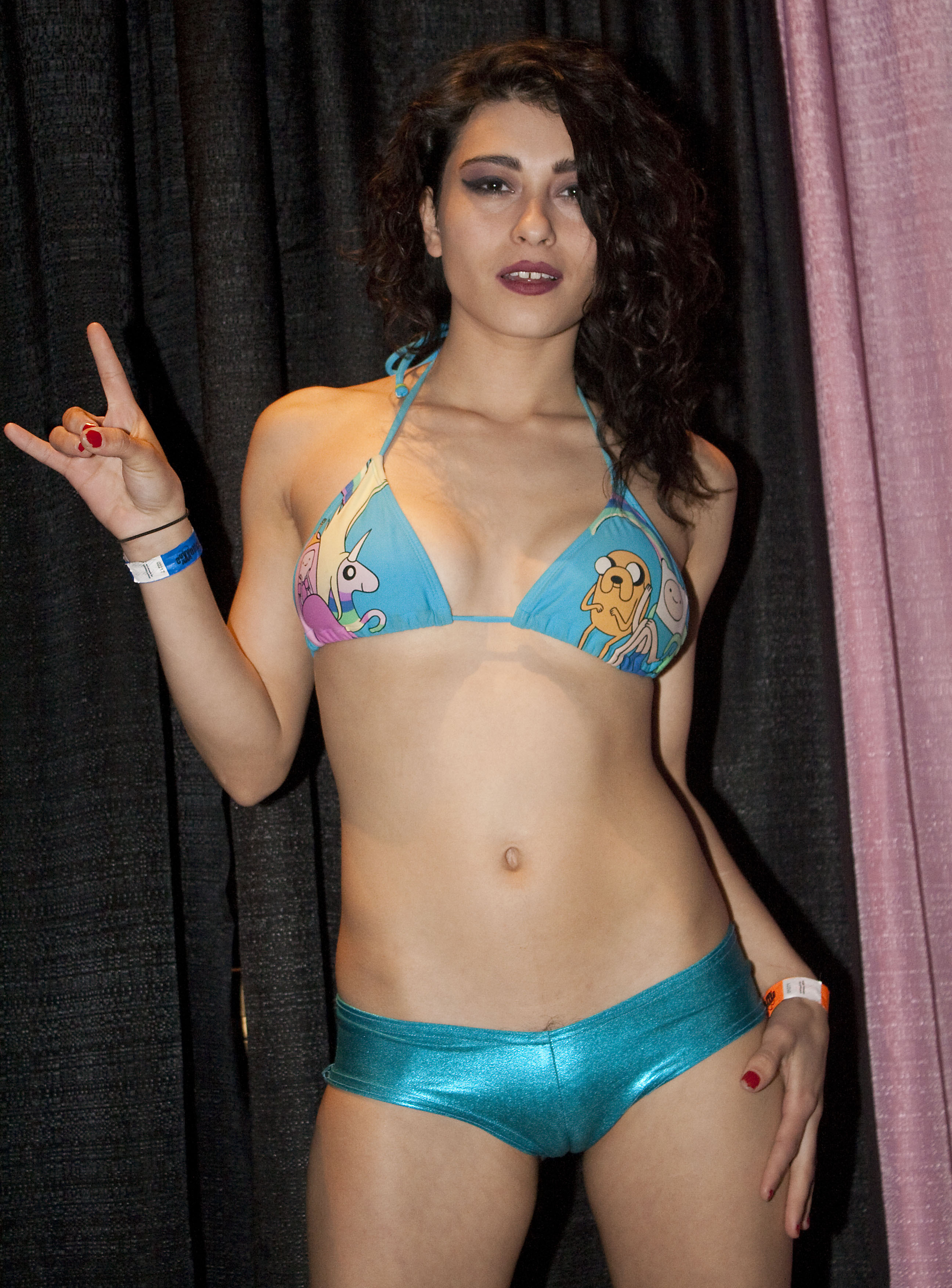 ExxxAC2014_152bas